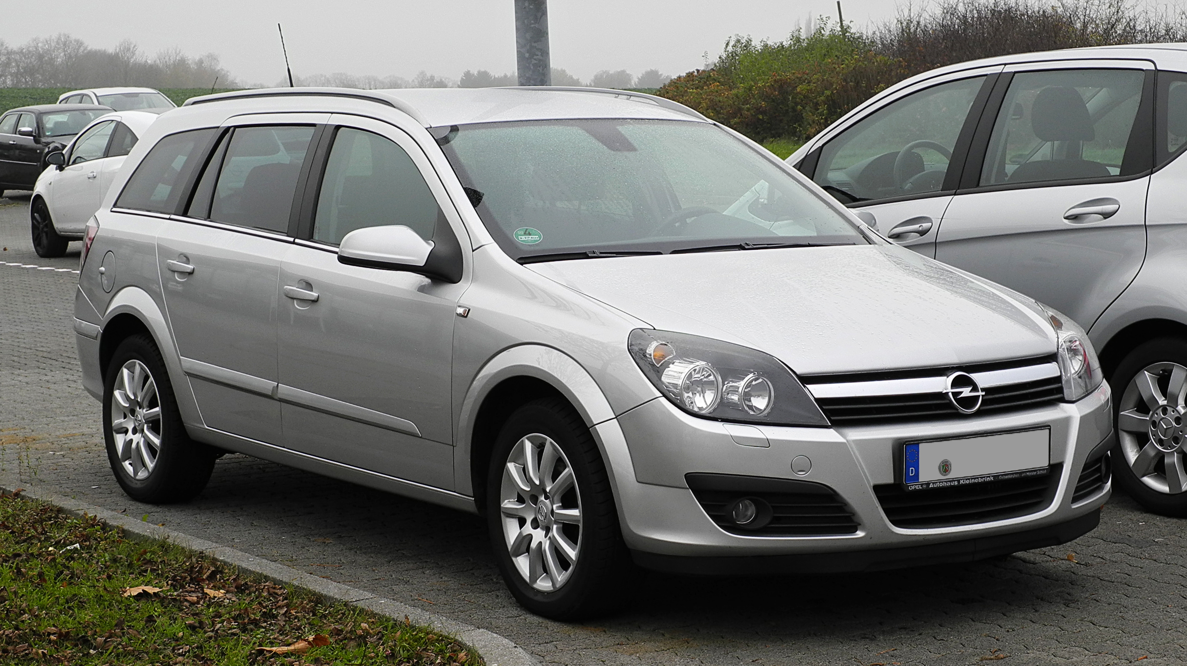 Opel Astra Caravan 1.7 CDTI Elegance (H)